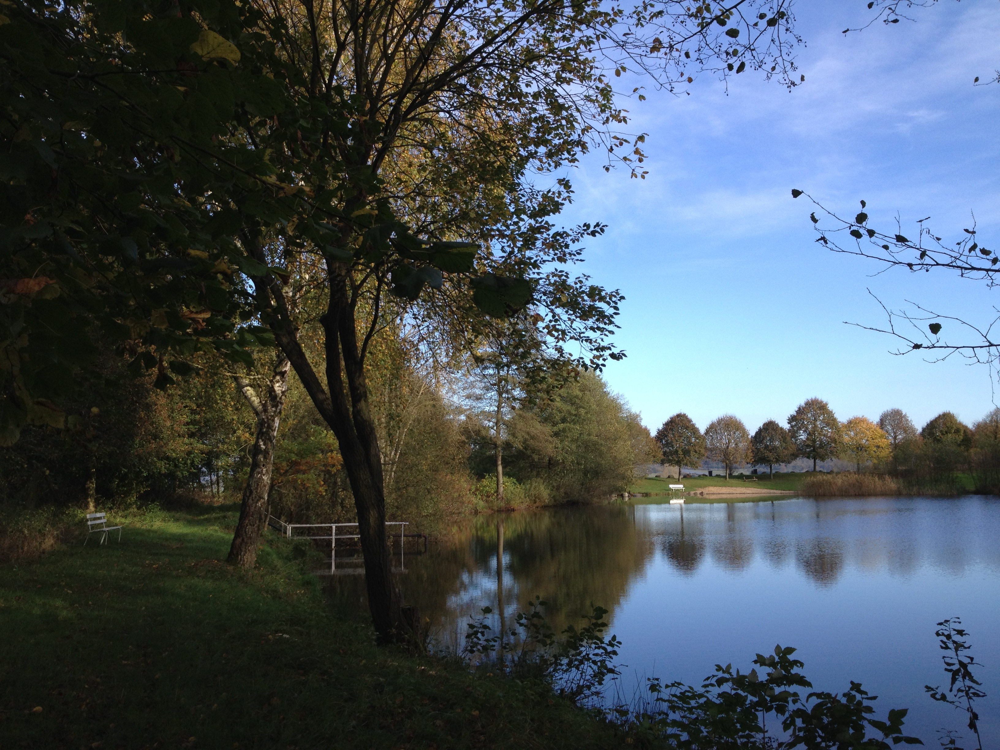 Der Badesee nördlich des Goldbergsee